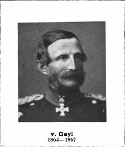 Freiherr Wilhelm Karl Friedrich von Gayl (* 21.04.1814; 11.01.1879), Generalmajor